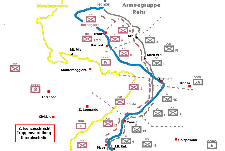 Truppenverteilung im Abschnitt Nord der 2. Schlacht am Isonzo